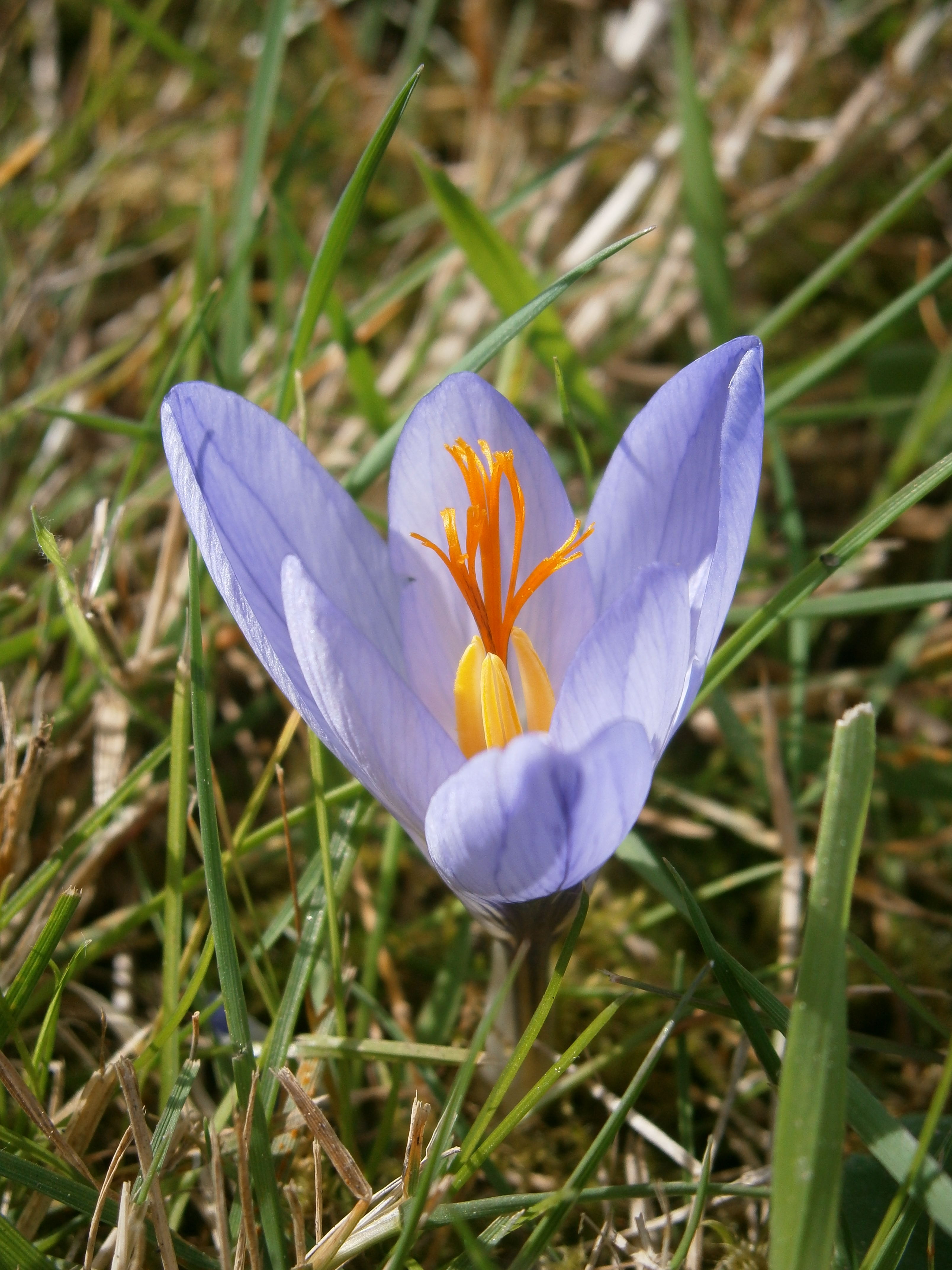 Crocus cancellatus close-up